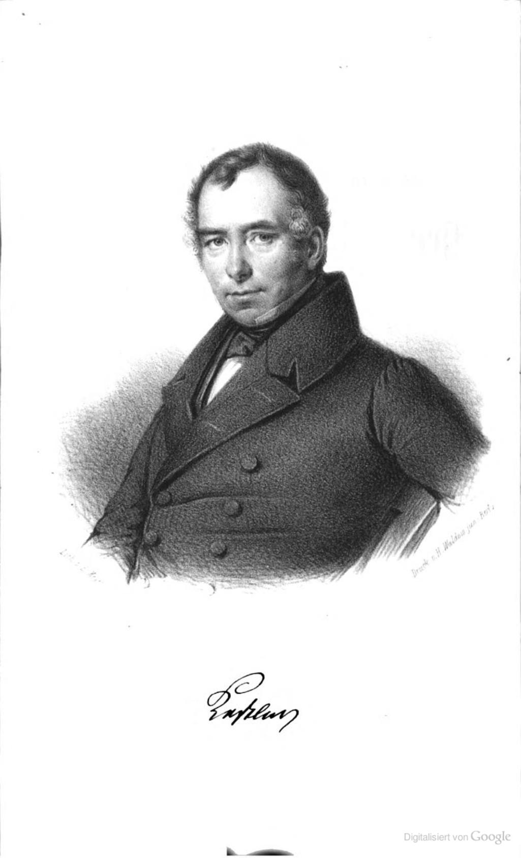 (* 24. März 1782 in Herpf bei Meiningen; † 18. Mai 1846 in Berlin) war Königlich preußischer Wirklicher Geheimer Rat, dann Regierungspräsident von Arnsberg, Schriftsteller und Übersetzer